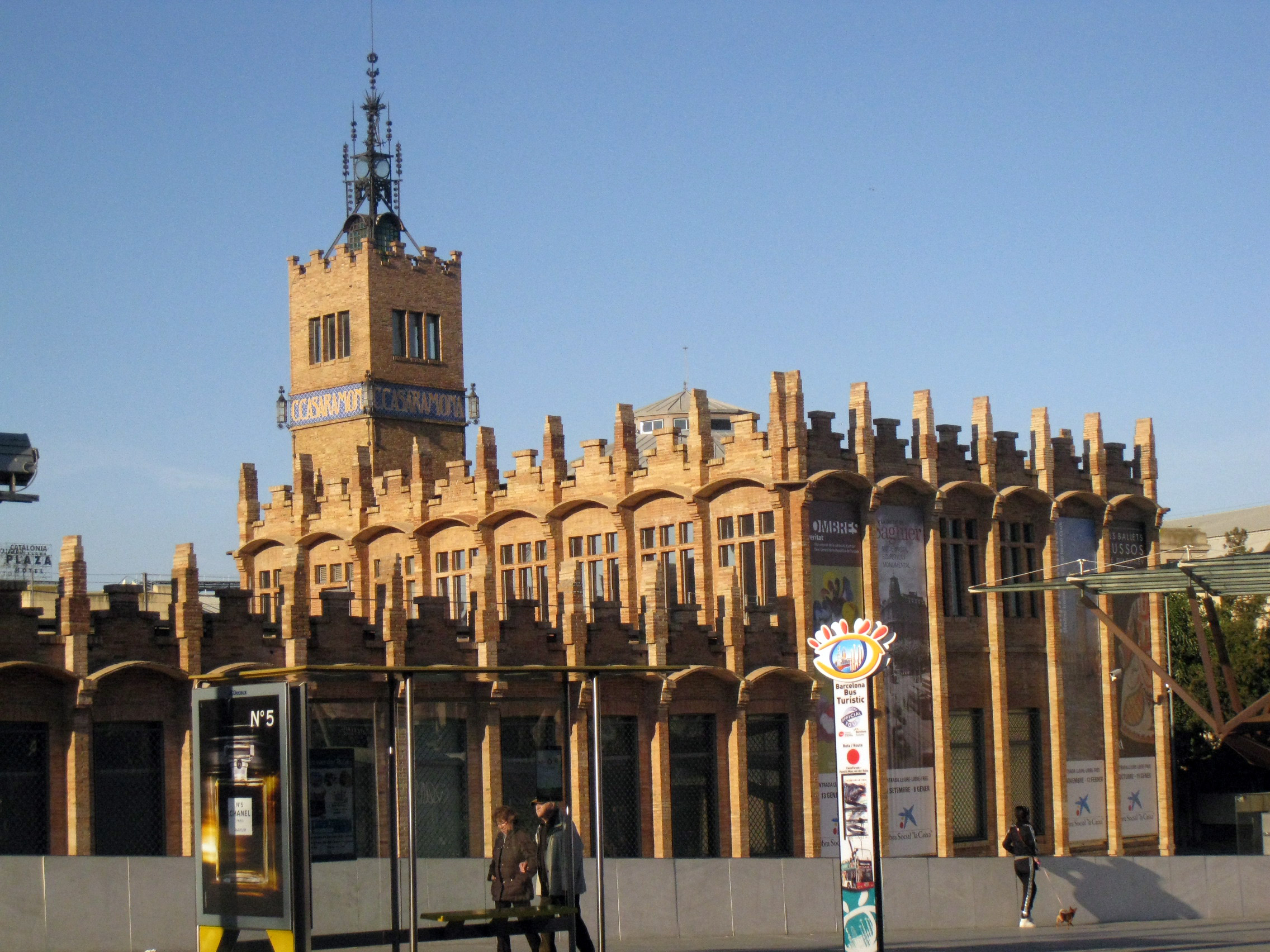 Fàbrica Casaramona (Barcelona)